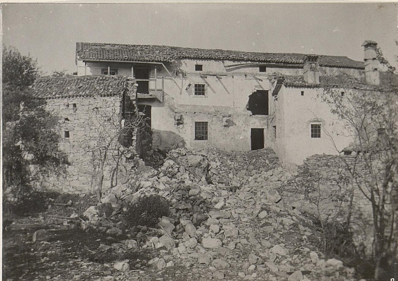 Zerstörtes Haus in Cerovlje 25.8.17.